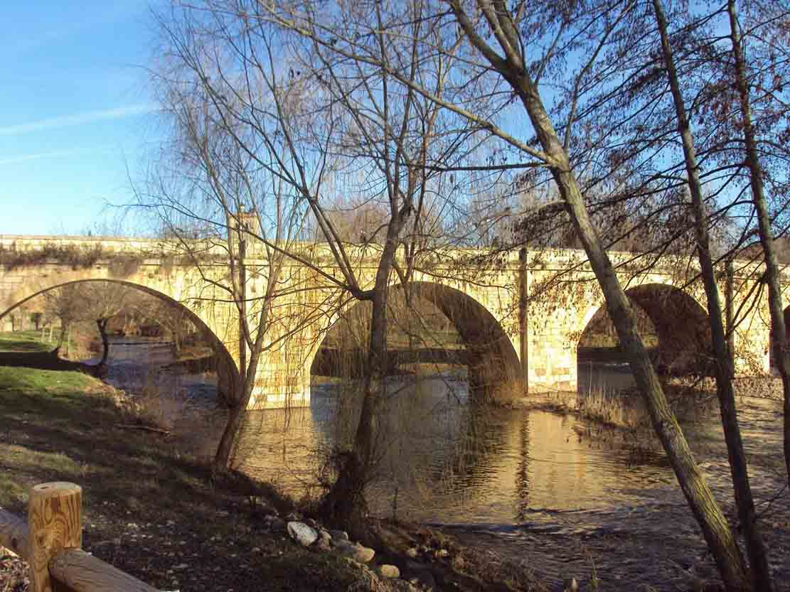 Puente de San Pablo en Covarrubias, en la provincia de Burgos que cruza el río Arlanza.